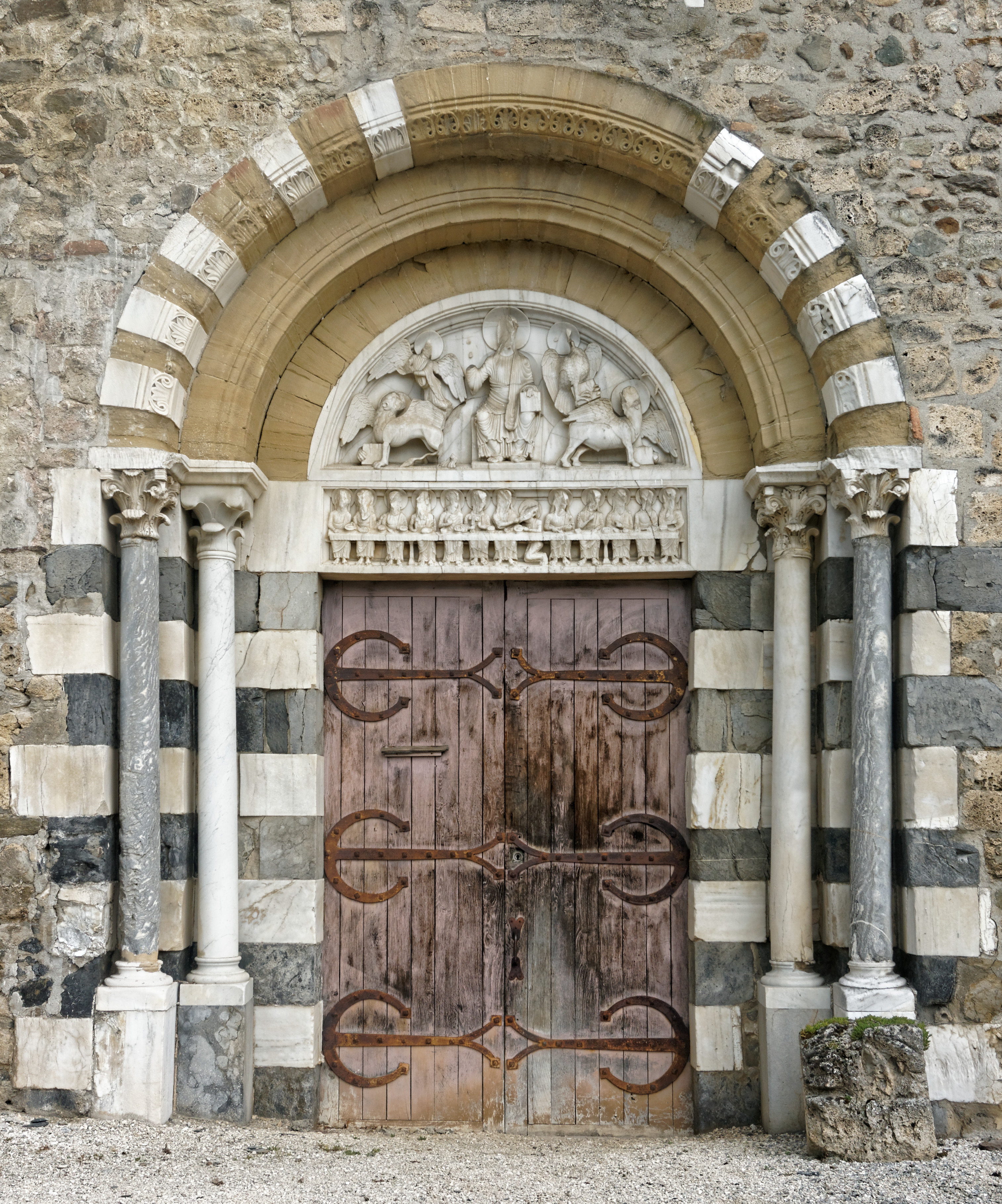 portail du prieuré de Vizille avec un tympan sculpté en marbre de Notre-Dame de Mésage. Le tympan offre une représentation du Christ en Majesté entouré des quatre évangélistes. Sur le linteau est sculptée la Cène.